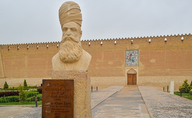 تعطیلی اماکن گردشگری شیراز